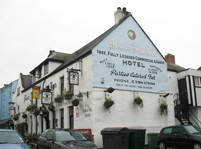 The Black Boy Inn, Caernarfon, Gwynedd